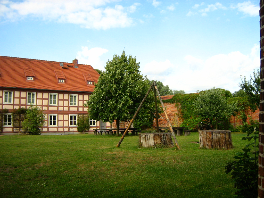 Die alte Bischofsburg in Wittstock/Dosse (landkreis Ostprignitz-Ruppin, Brandenburg). Blick in den ehm. Burghof.